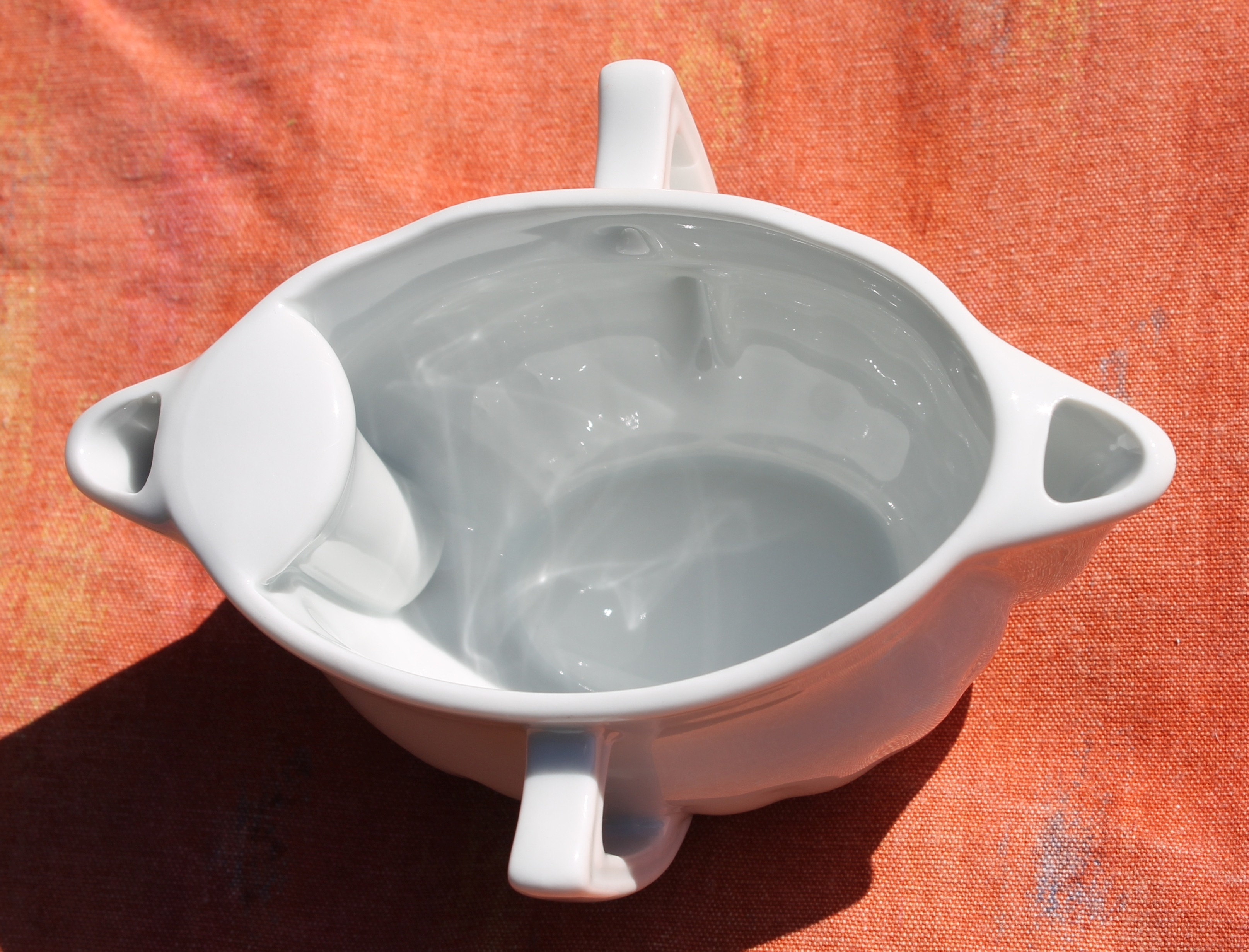 Fetttrenn-Sauciere